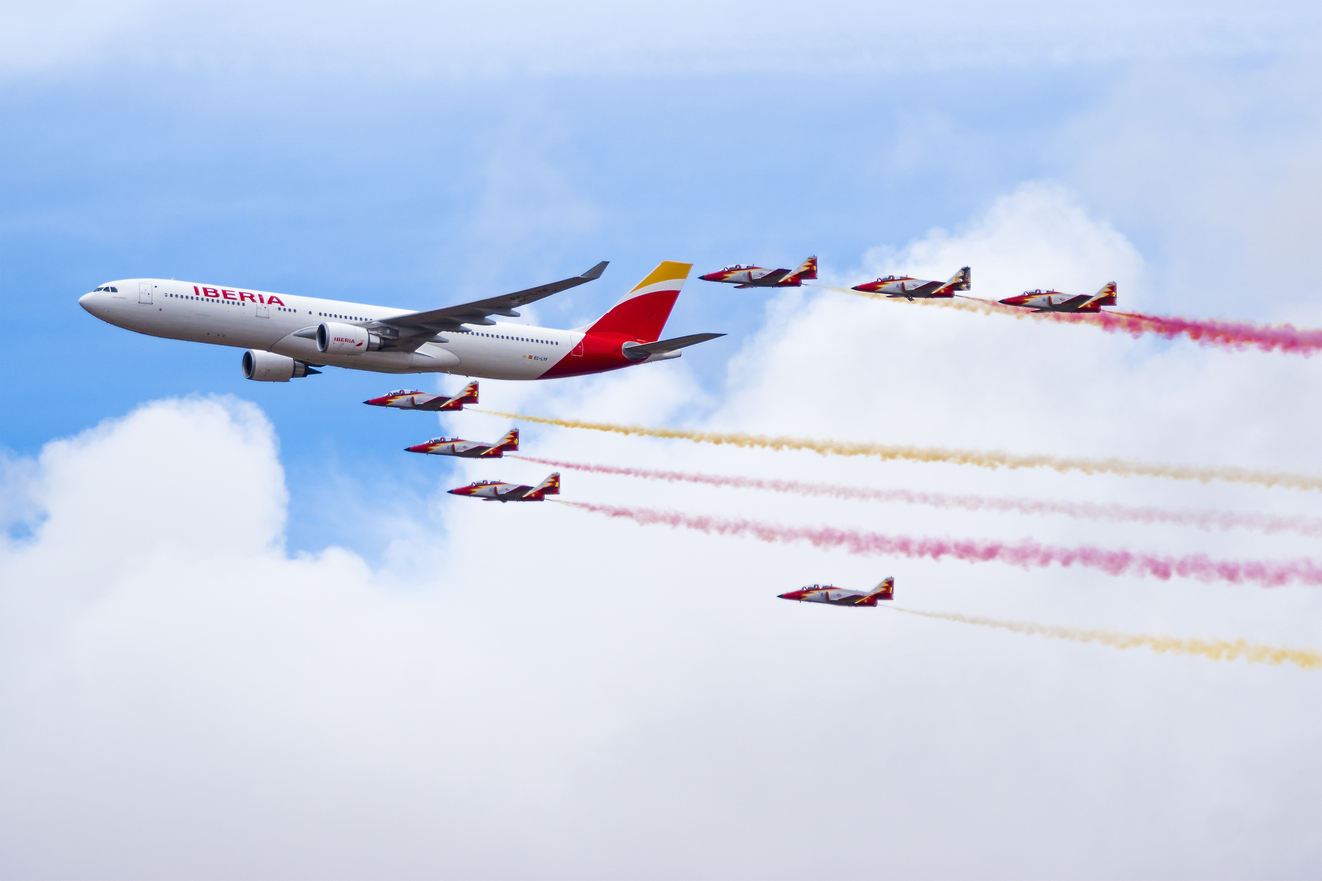 Aire75 Airshow 75 aniversario del Ejercito del Aire